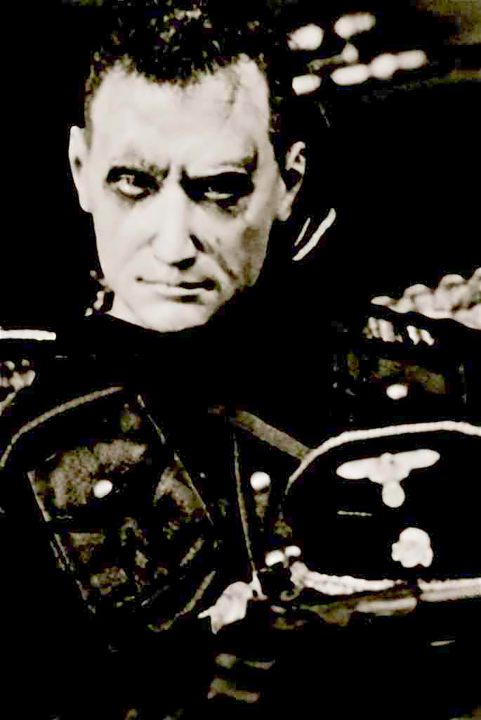 Fotografie des US-amerikanischen Künstlers Stefan Krikl, aus der Serie Assassination of Reinhard Heydrich. Es handelt sich um eine Fotoaufnahme einer von Krikl geschaffenen Miniatur-Szene aus seinem Projekt Achtung, Kamera, Aktion! und stellt eine Charakterstudie eines „SS-Führer-Typus“ von Krikl dar, die von ihm unter anderem in der genannten Serie als den SS-Obergruppenführer und Stellvertretenden Reichsprotektor von Böhmen und Mähren, Reinhard Heydrich, „verwendet“ wurde. Daten: 35 mm Kleinbildfilm, vom Dia auf Schwarz-Weiß-Fotopapier, verschiedene Größen, Entstehungszeitraum: 2000–2005. (Urheberrechtliche Hinweise: Stefan Krikl ist Schöpfer der Miniatur-Szene, die von ihm selbst fotografiert wurde. Das Foto wurde von ihm unter eigenem Namen sowie mit der CreativeCommons-Lizenz CC-BY auf der Flickr-Plattform veröffentlicht.)